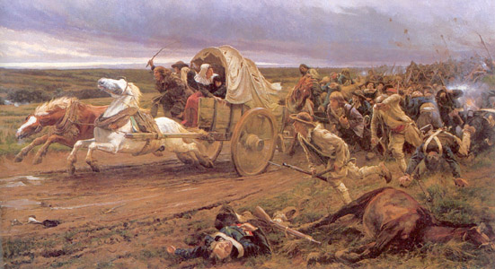 La déroute de Cholet